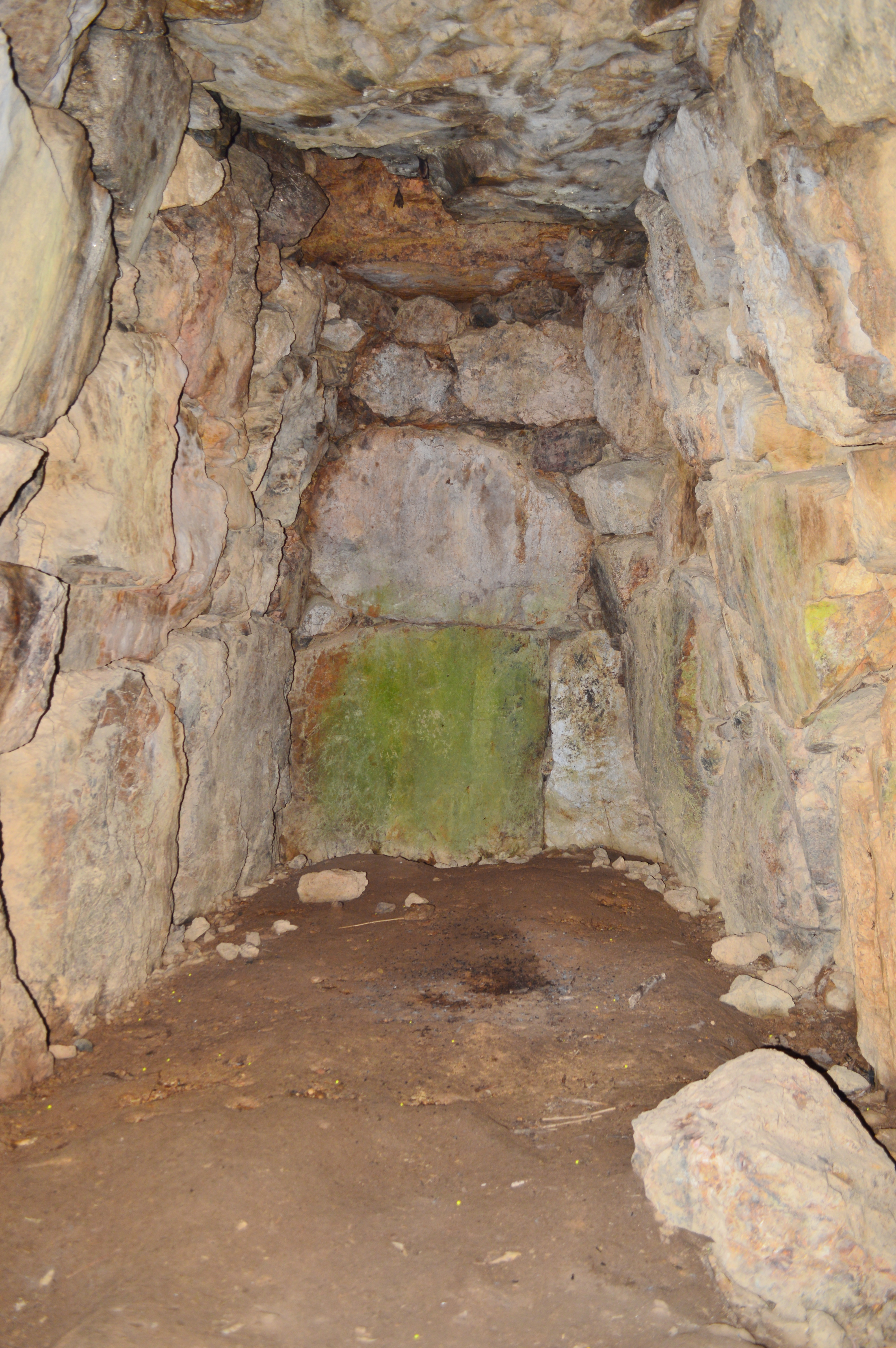 妙徳山古墳 石室玄室